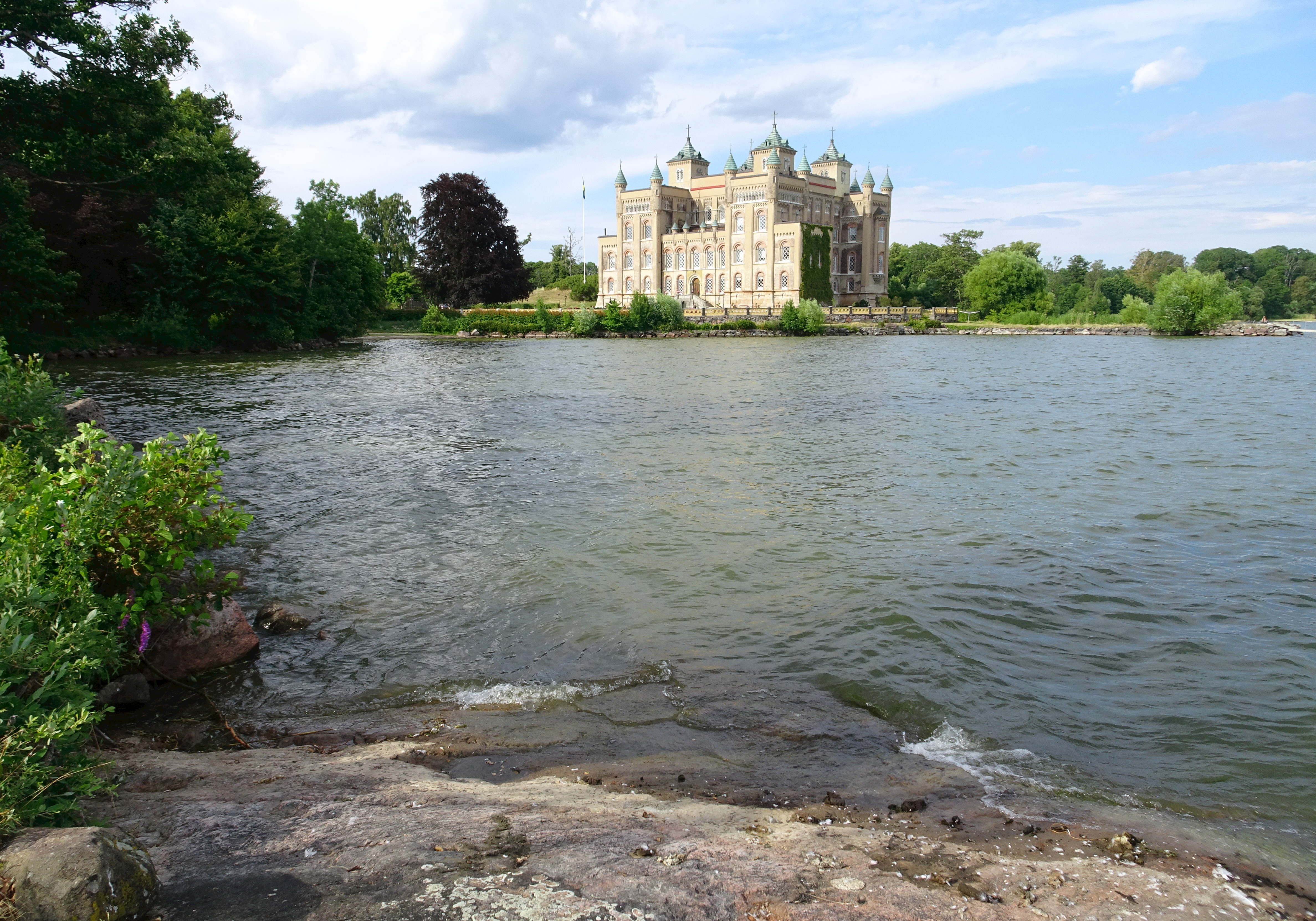 Stora Sundby slott från sjösidan